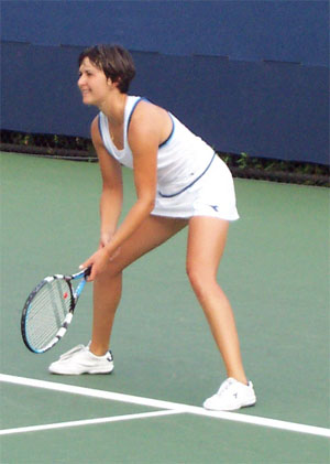 Yuliya Beygelzimer Self Made